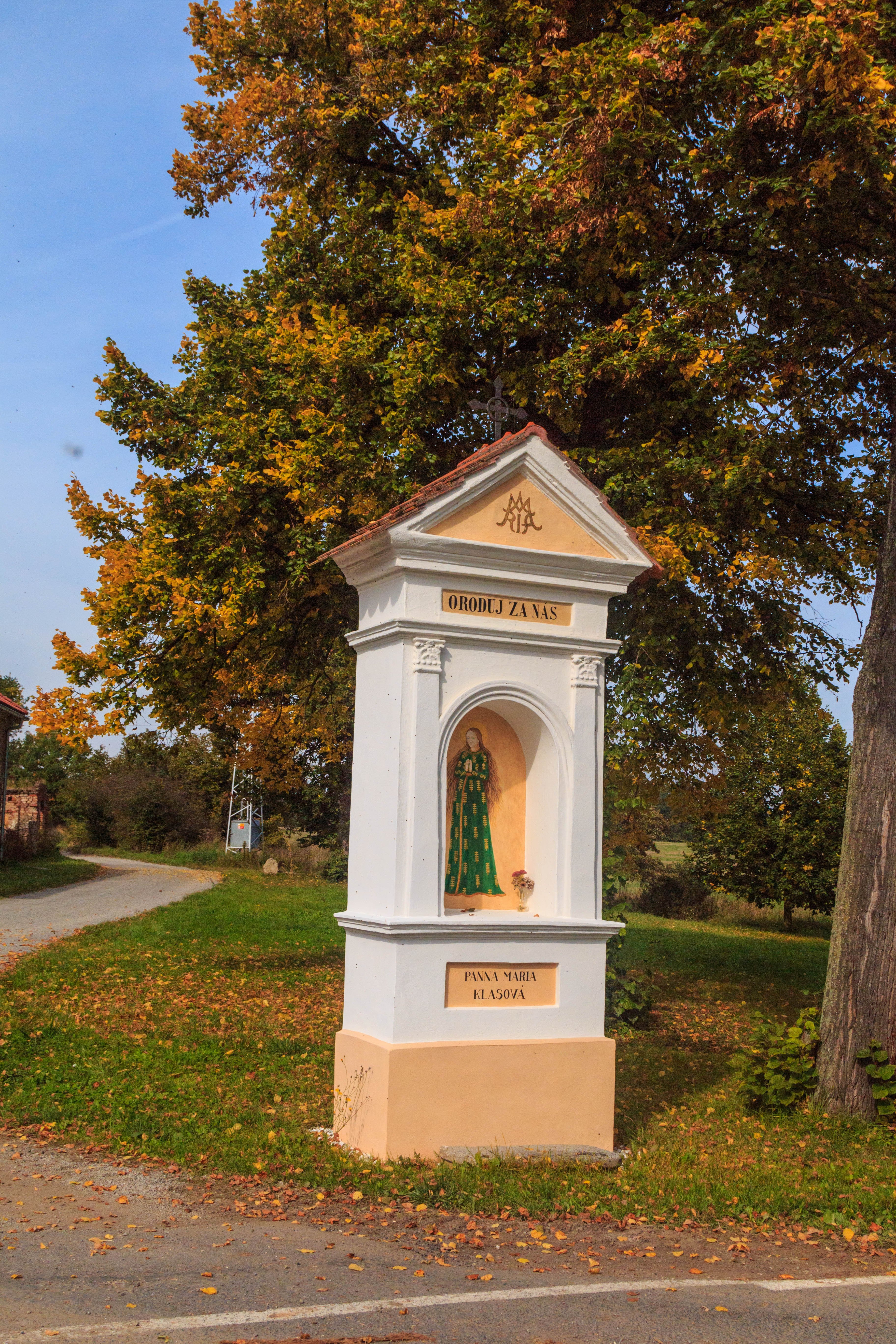 Klínovice - výklenková kaplička